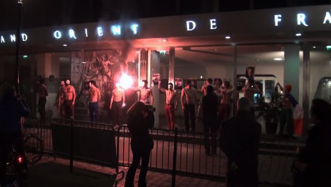 Le Printemps français, accompagné d'« Hommens », opposants au mariage pour tous, a organisé le 24 mai 2013 une « manifestation antimaçonnique contre la secte maçonnique. »